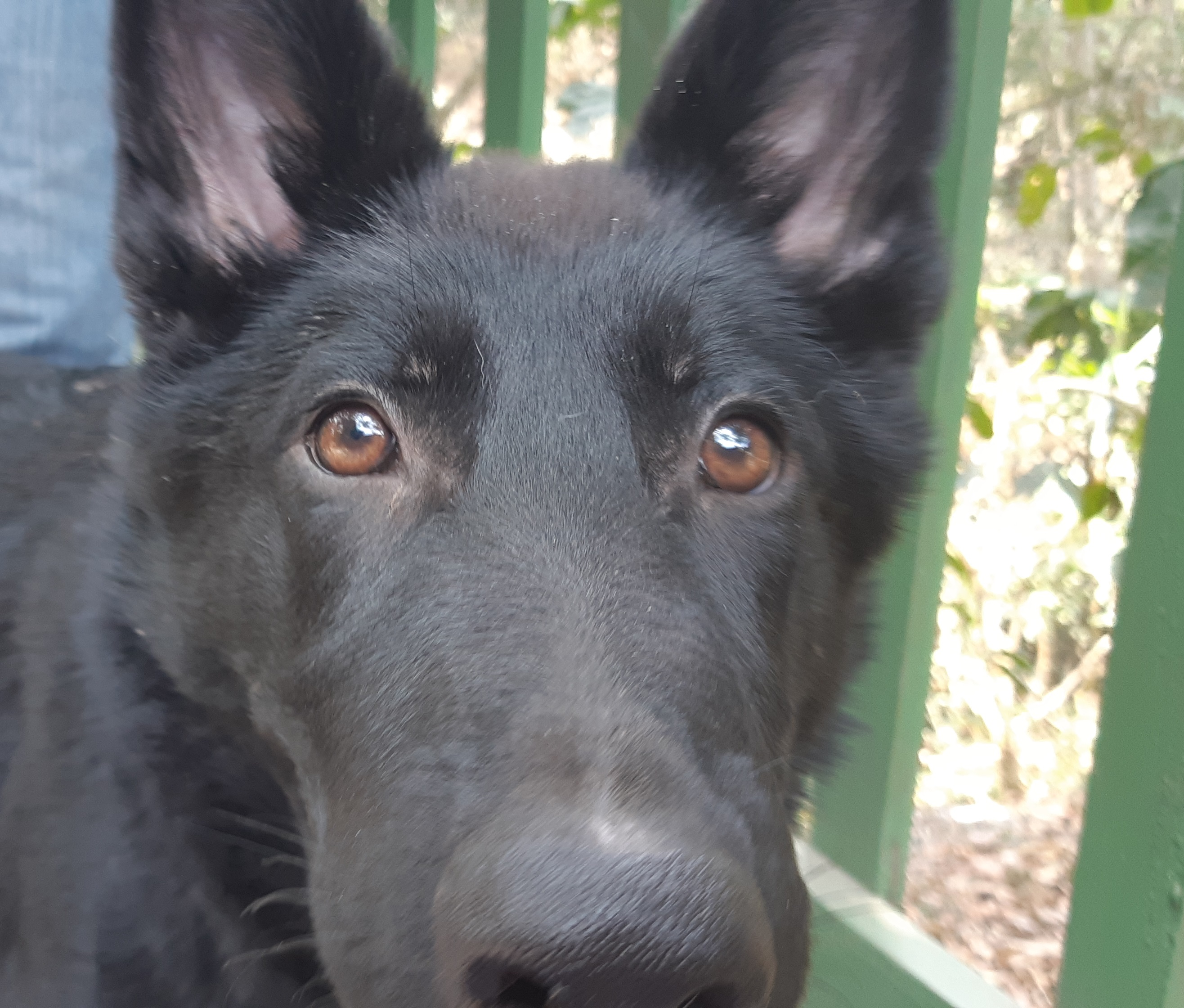 Calupoh, 5 meses.